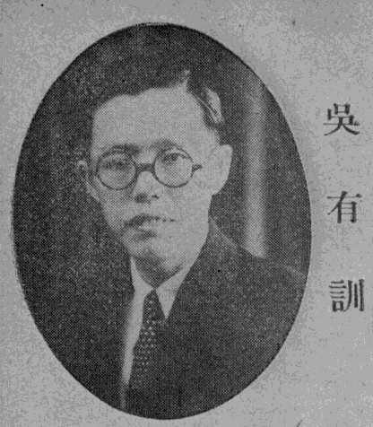 中文（台灣）: 吳有訓肖像